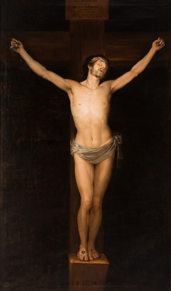 La obra muestra a Jesucristo agonizando en la cruz.